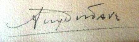 signature Auguste Distave